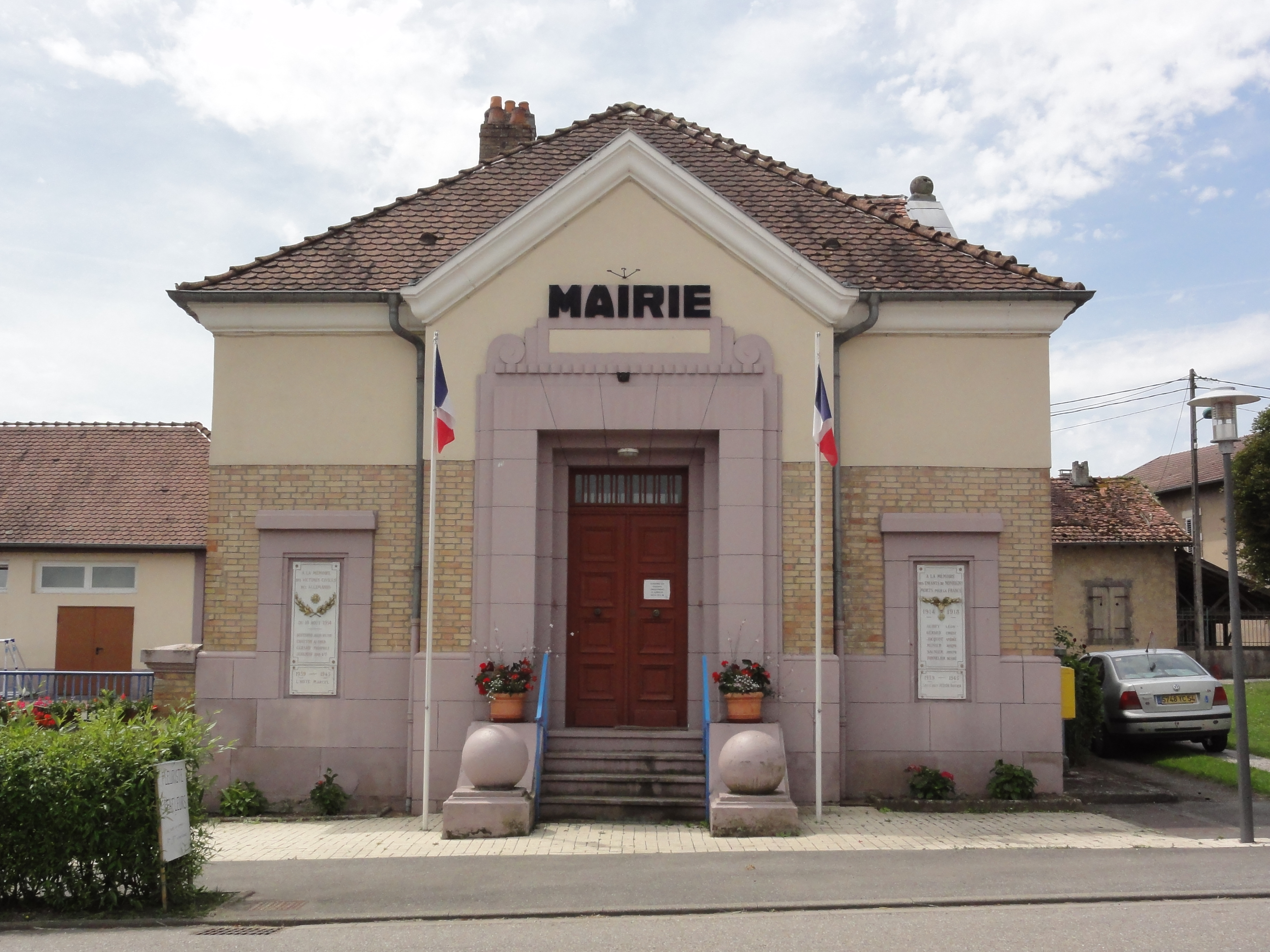 Nonhigny (M-et-M) mairie